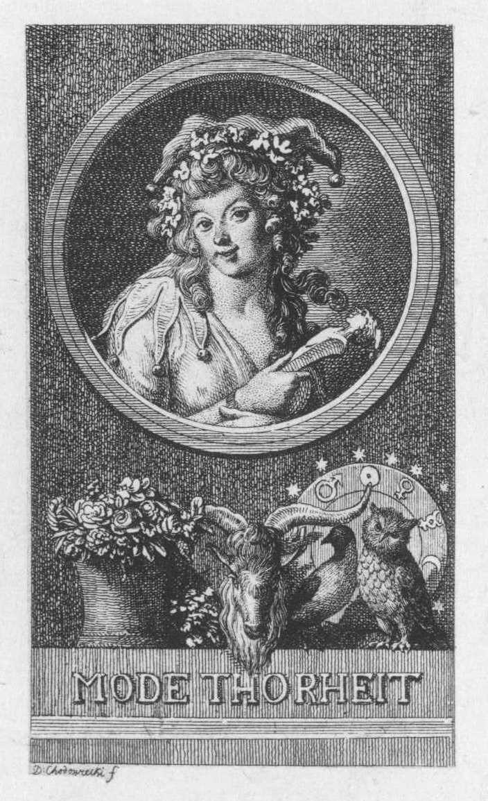 Modethorheit. (Titelkupfer zum Berliner Genealog. Kalender von 1789.) (Beschreibung lt. Quelle)